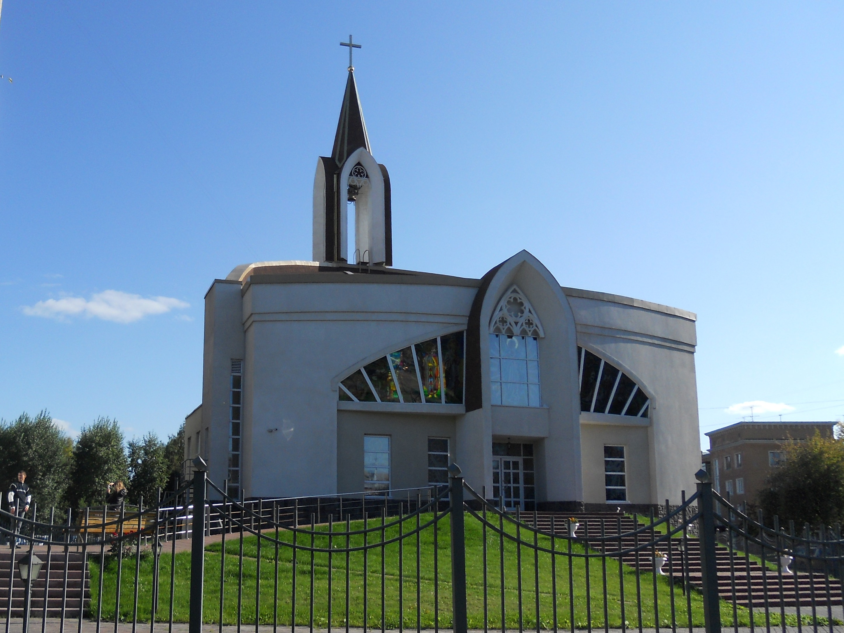 Костёл Непорочного Сердца Пресвятой Девы Марии (Кемерово)